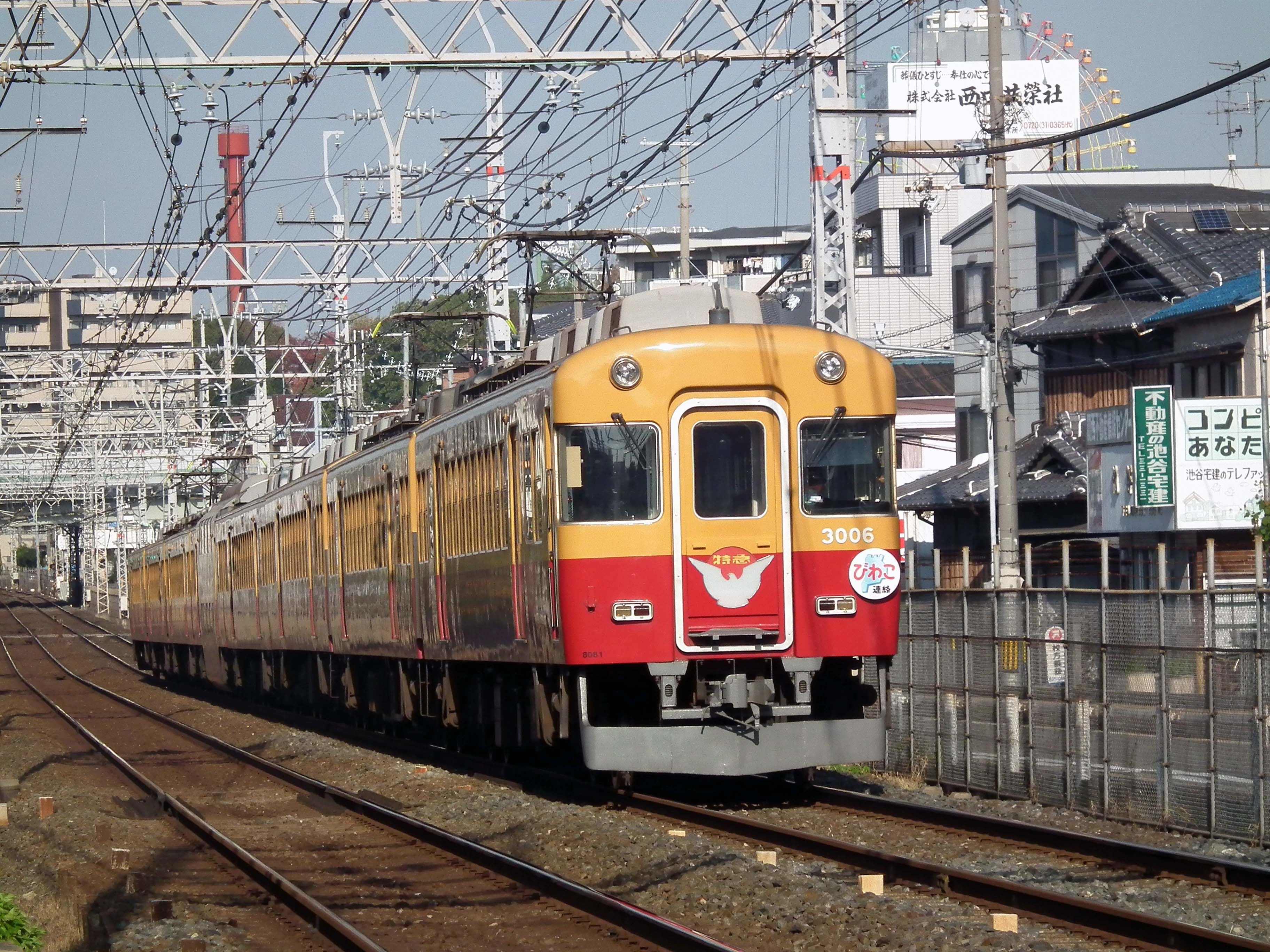 京阪3000系による復活「びわ湖連絡」特急。大阪府枚方市、京阪本線、枚方公園-光善寺間。